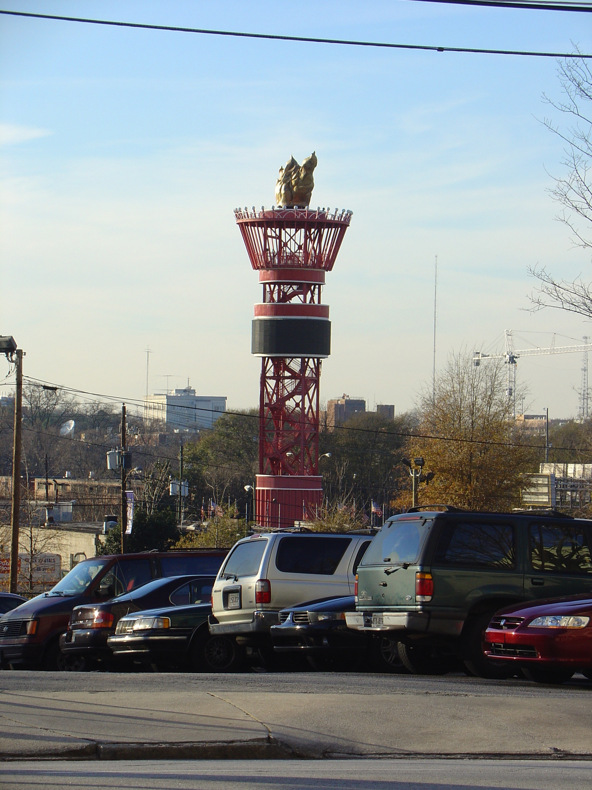 La tour olympique de Anderson à Atlanta Benjamin KERR